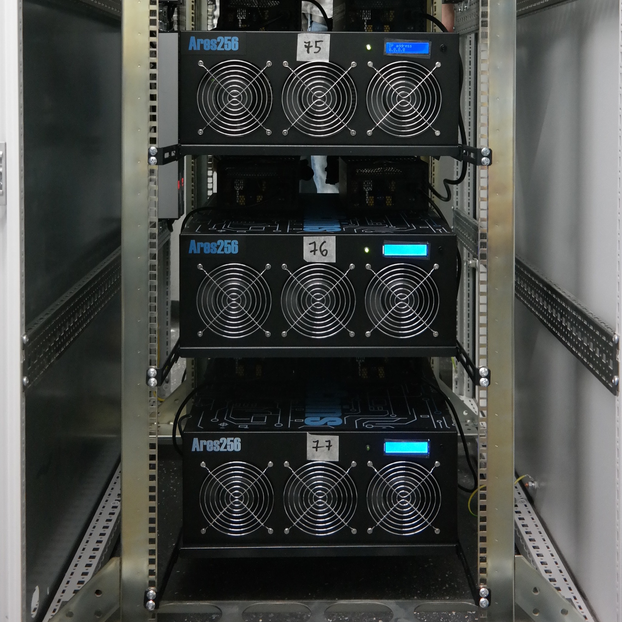 Стойка с майнерами Ares256 в дата-центре HashFlare.